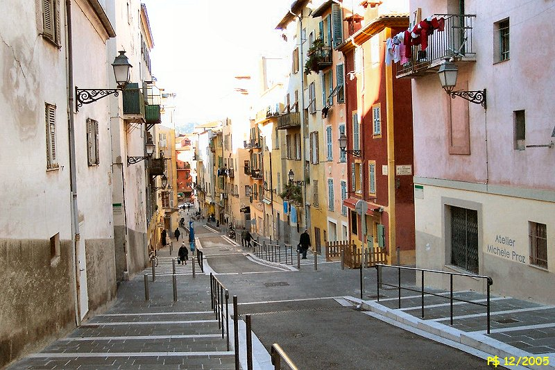 La rue Rossetti prise dans le sens aval. Au fond, la place Rossetti et la place aux herbes.